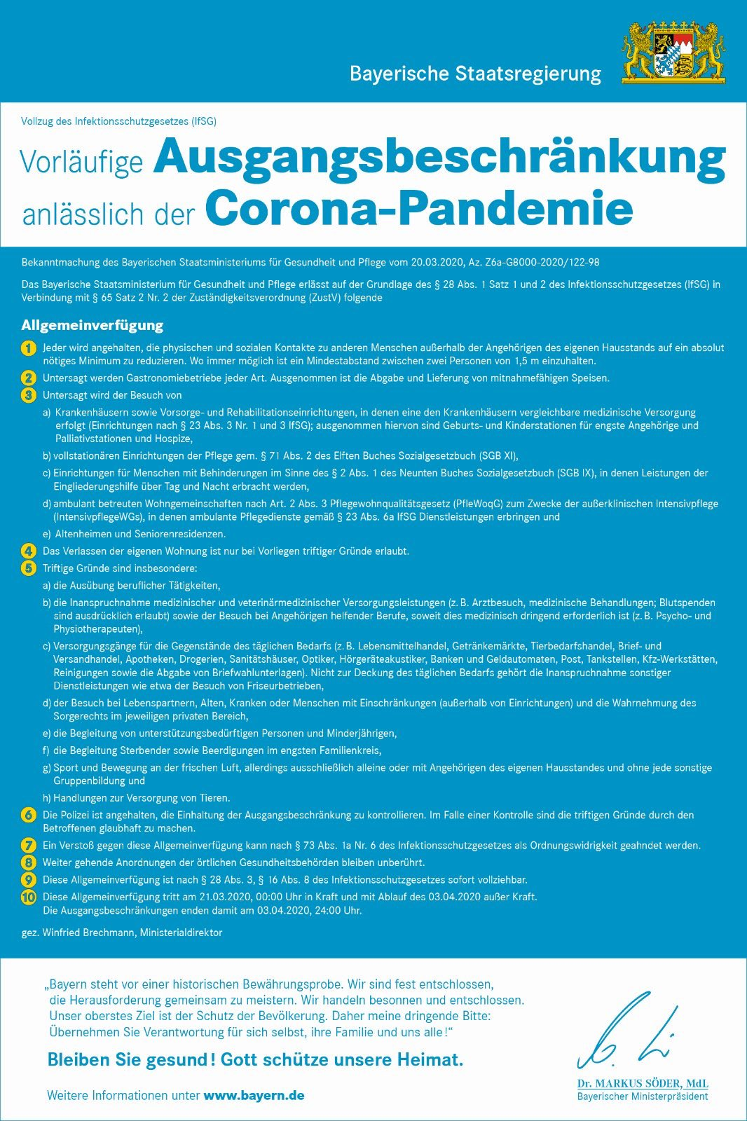 Öffentliche Bekanntmachung: “Vorläufige Ausgangsbeschränkung anlässlich der Corona-Pandemie” (digitales Plakat)